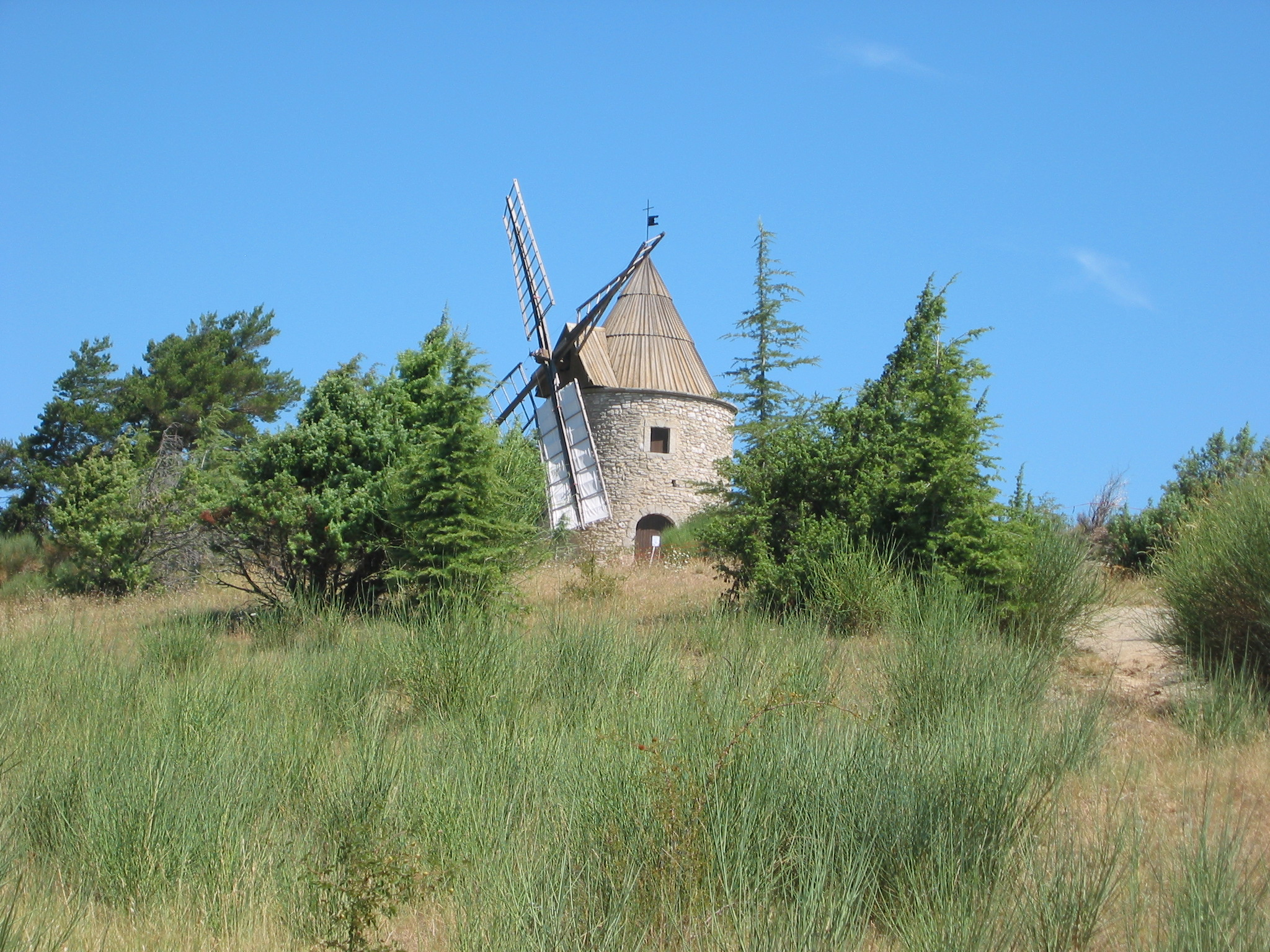 Montfuron, Alpes-de-Haute-Provence, France Le Moulin à vent. Les hélices ont été abimées par un orage d'été. Photo prise le 30 juillet 2006 Aut : civodule